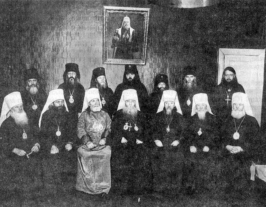 Веременный Патрирший Священный Синод при заместителе Патриаршего Местоблюстителя митрополите Нижегородском Сергии (Страгородском). 1 ряд (слева направо): митр. Павел (Борисовский), митр. Анатолий (Грисюк), митр. Арсений (Стадницкий), митр. Сергий (Страгородский), митр. Алексий (Симанский), митр. Серафим (Александров), митр. Константин (Дьяков). 2 ряд (слева направо): еп. Никита (Стягов), архиеп. Никон (Пурлевский), архиеп. Павел (Гальковский), архиеп. Питирим (Крылов), архиеп. Киприан (Комаровский), еп. Мефодий (Абрамкин), управляющий делами Синода прот. Александр Лебедев